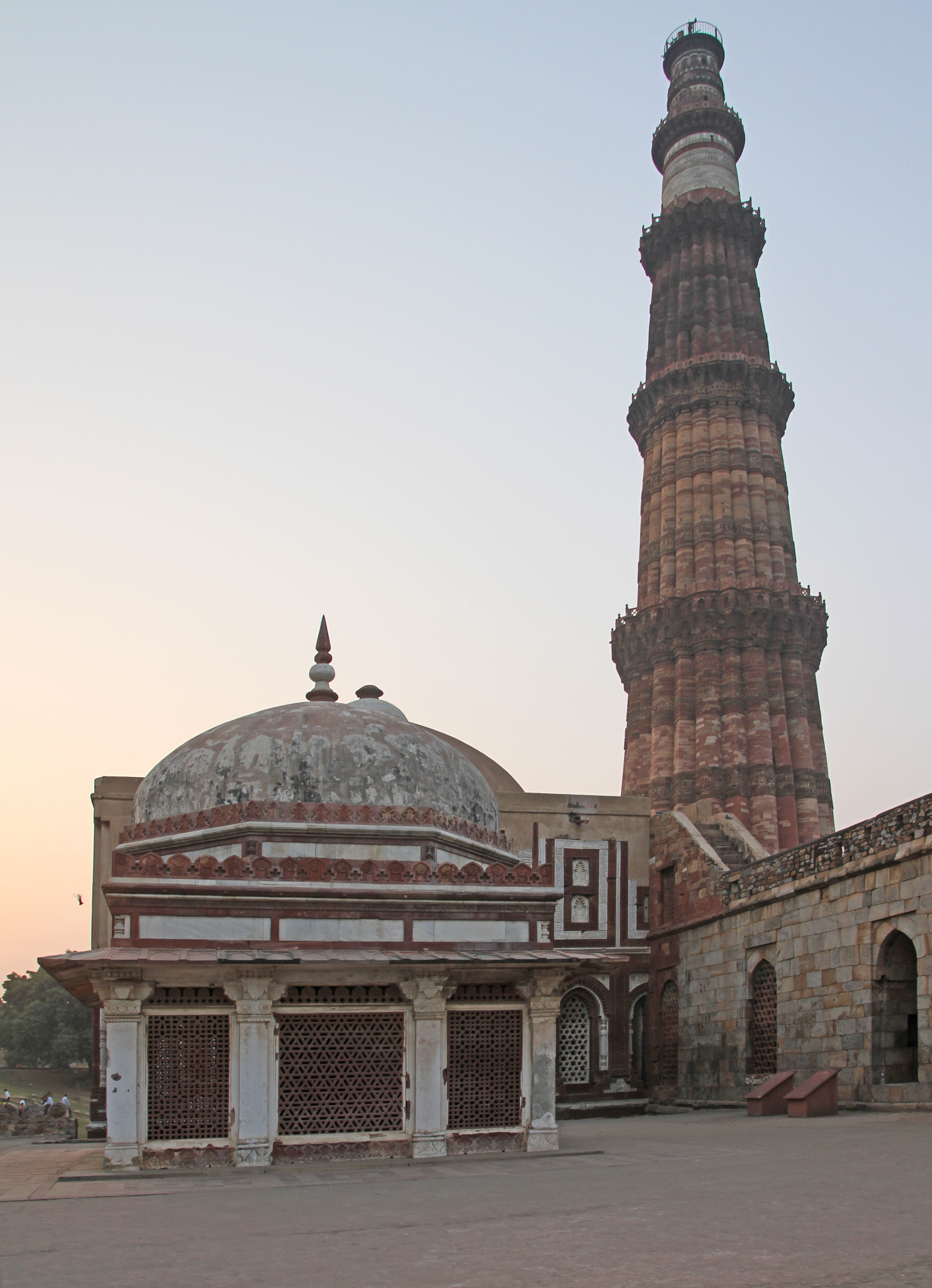 Qutb Minar